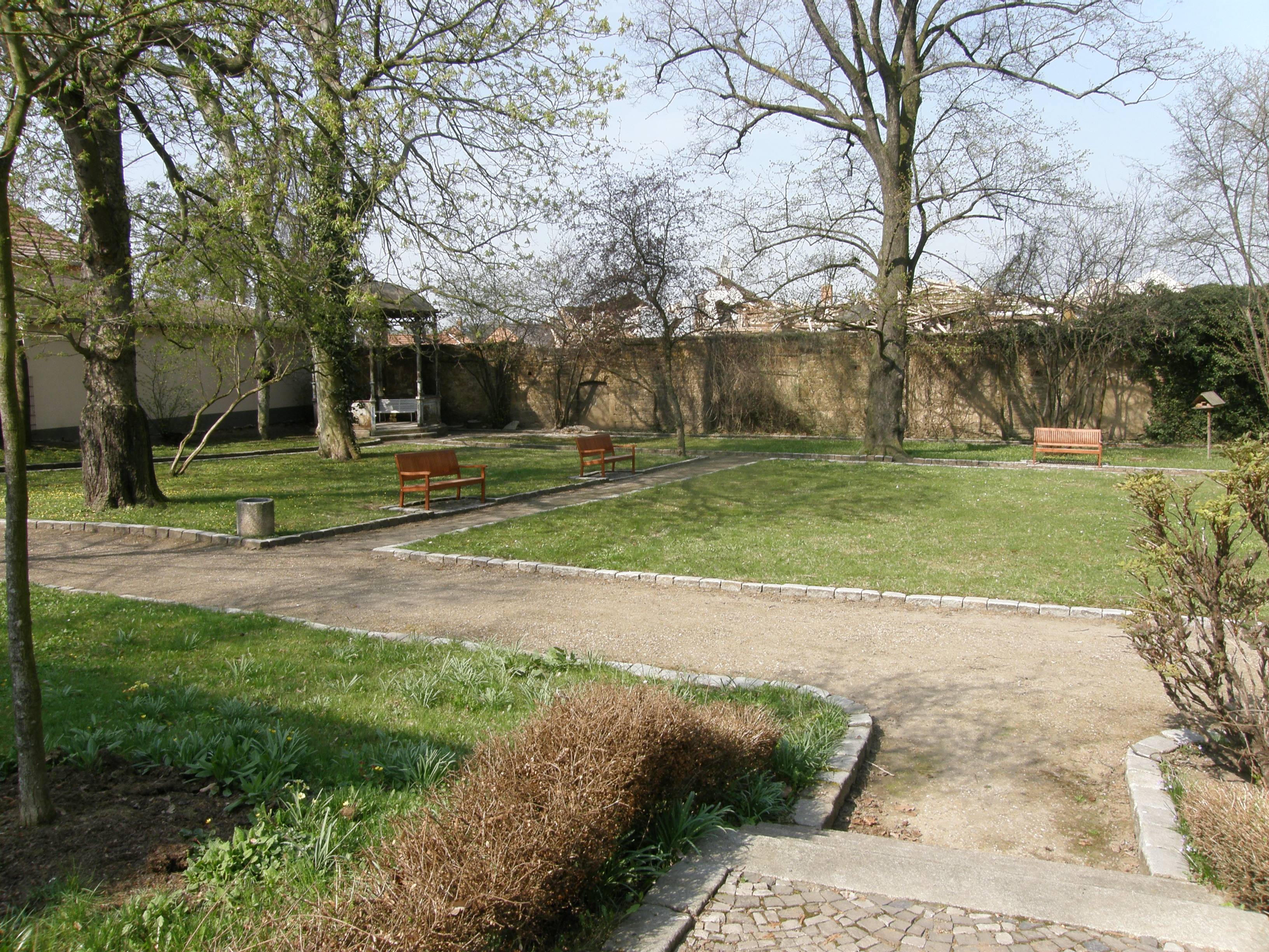 Stadt Apolda - Gartenbereich auf der Rückseite des Glockenmuseums